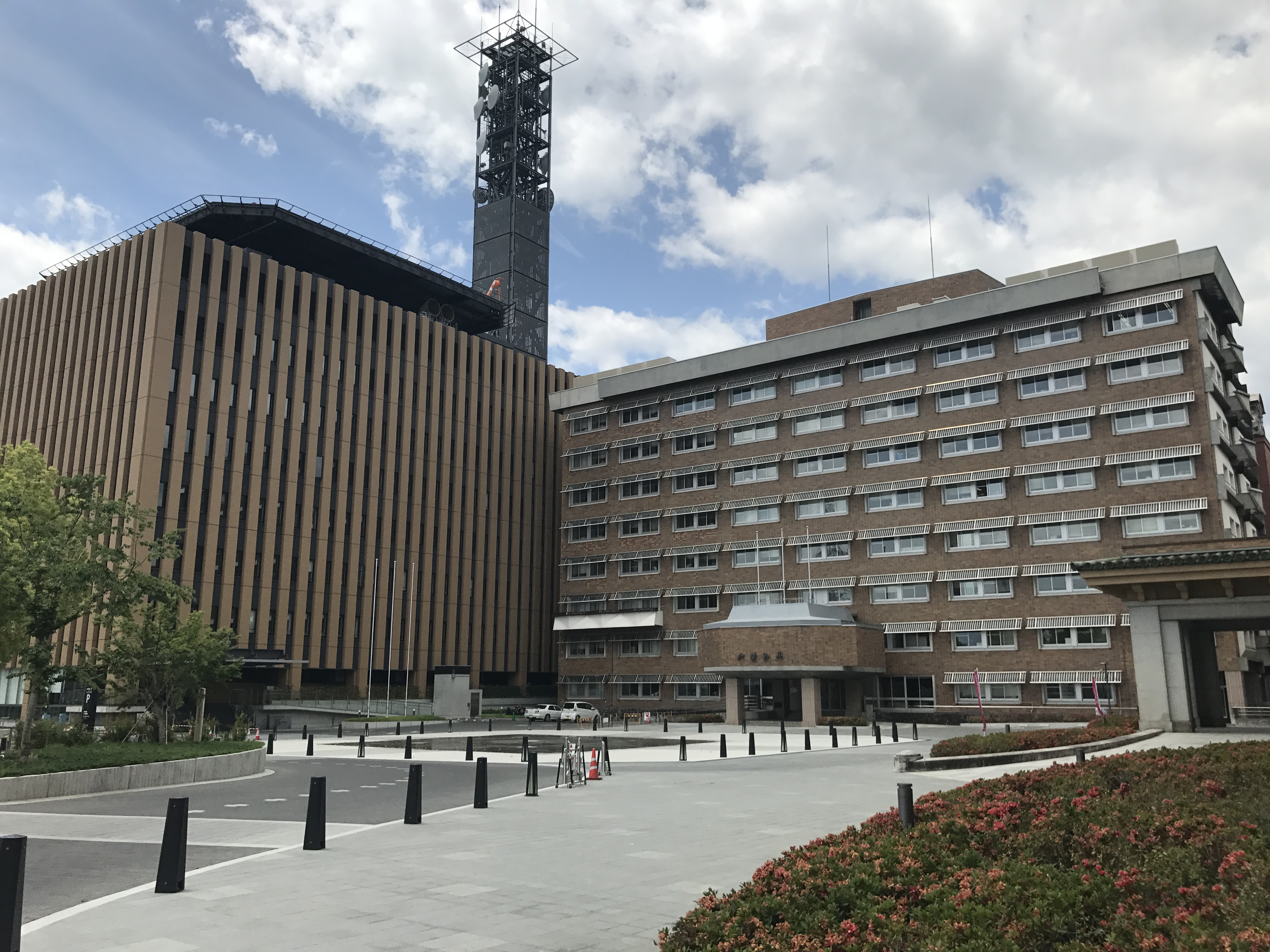 2017年5月6日撮影